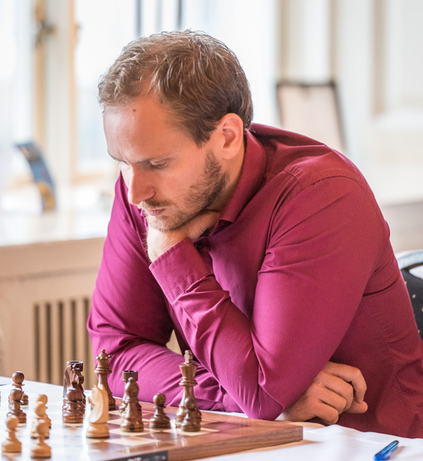 Hans Tikkanen. Foto: Lars OA Hedlund